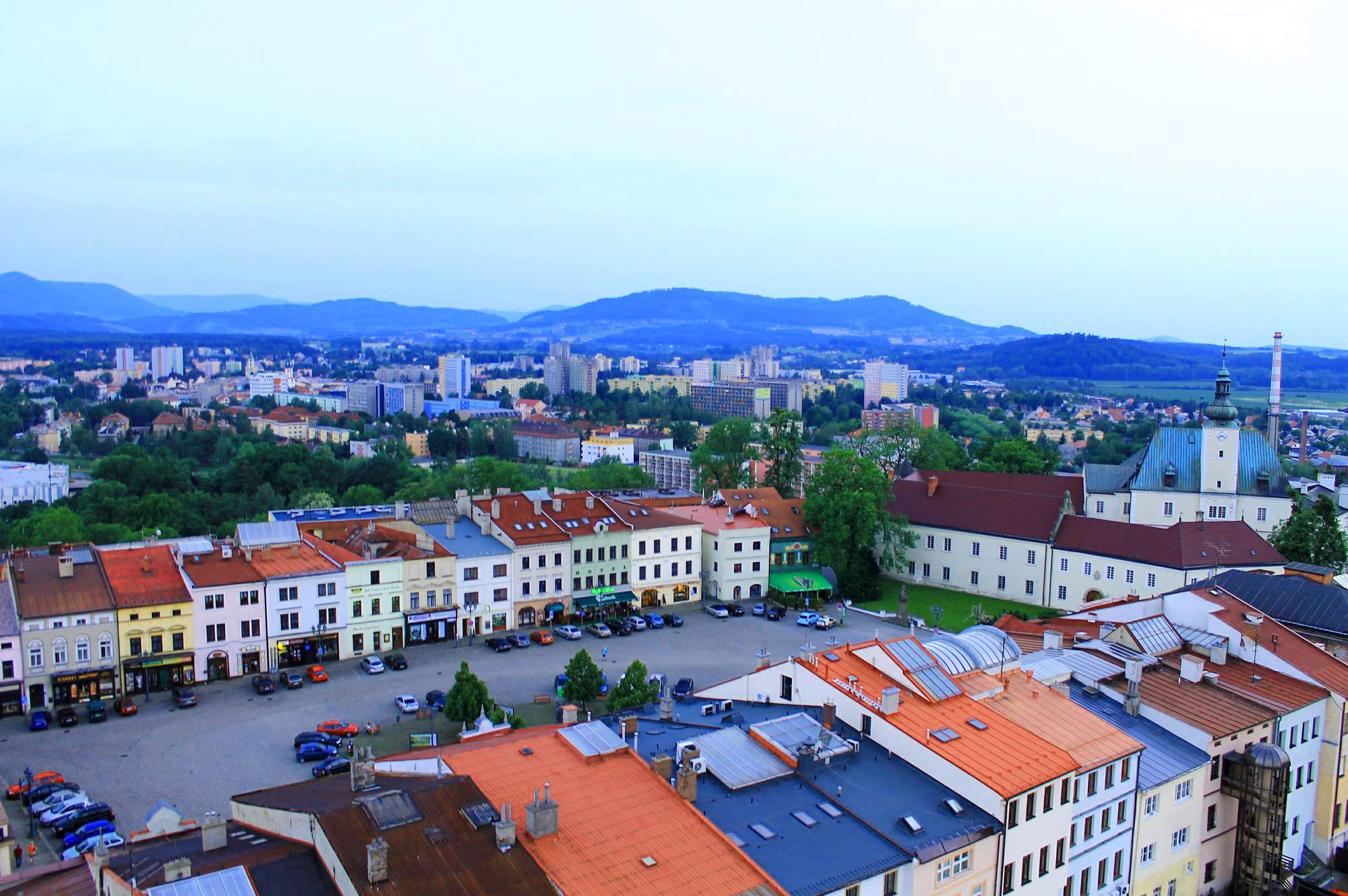 frydecke_namesti